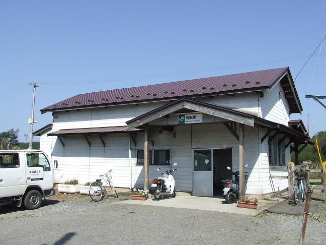 JR鳴沢駅駅舎